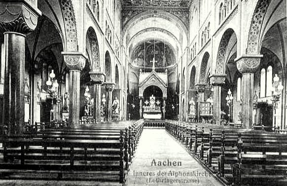 Klosterkirche St. Alfons des Aachener Redemptoristenordens um 1906